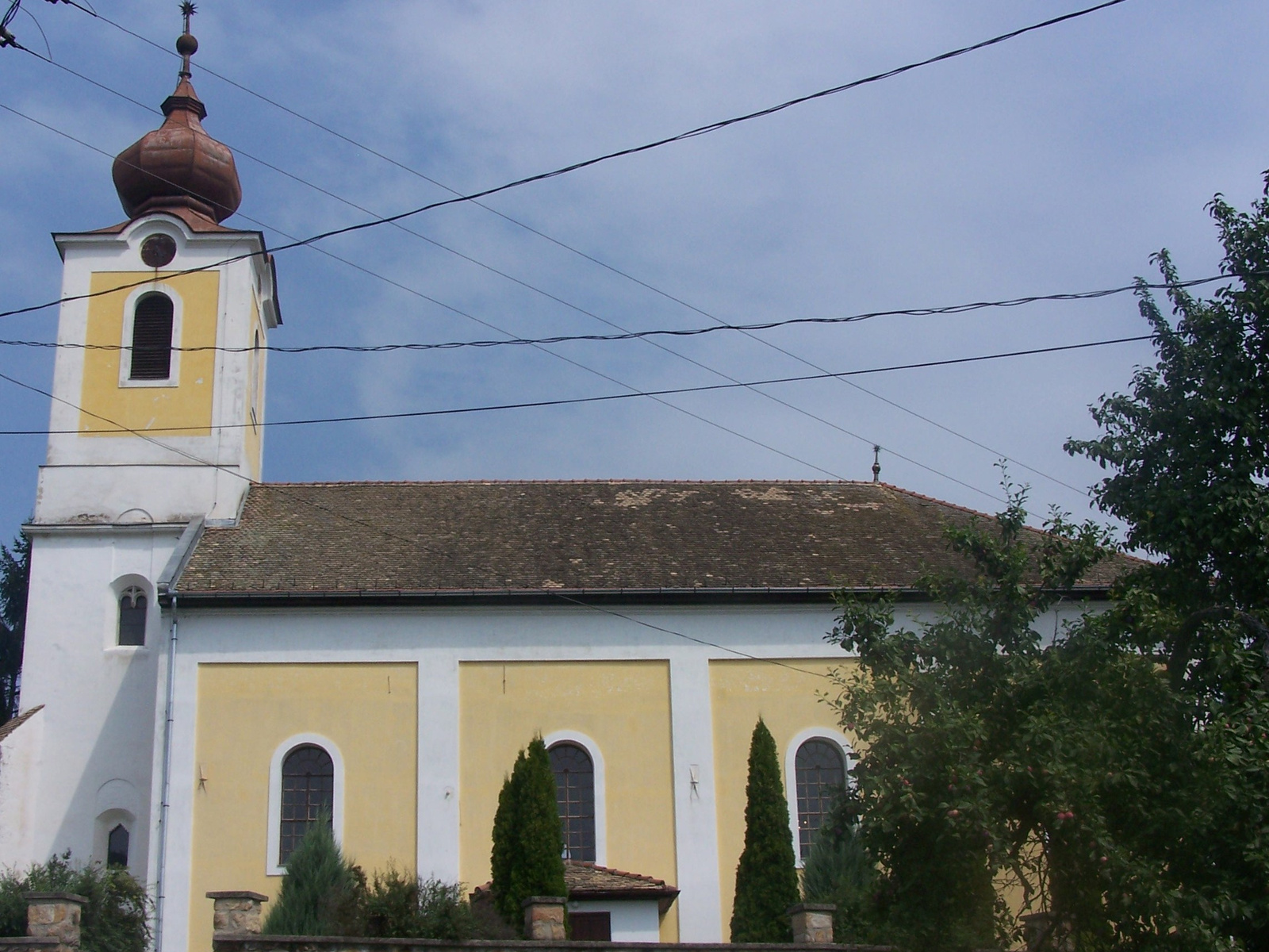 Református templom (Szokolya, Mányoki út 7.) This is a photo of a monument in Hungary. Identifier: 7420